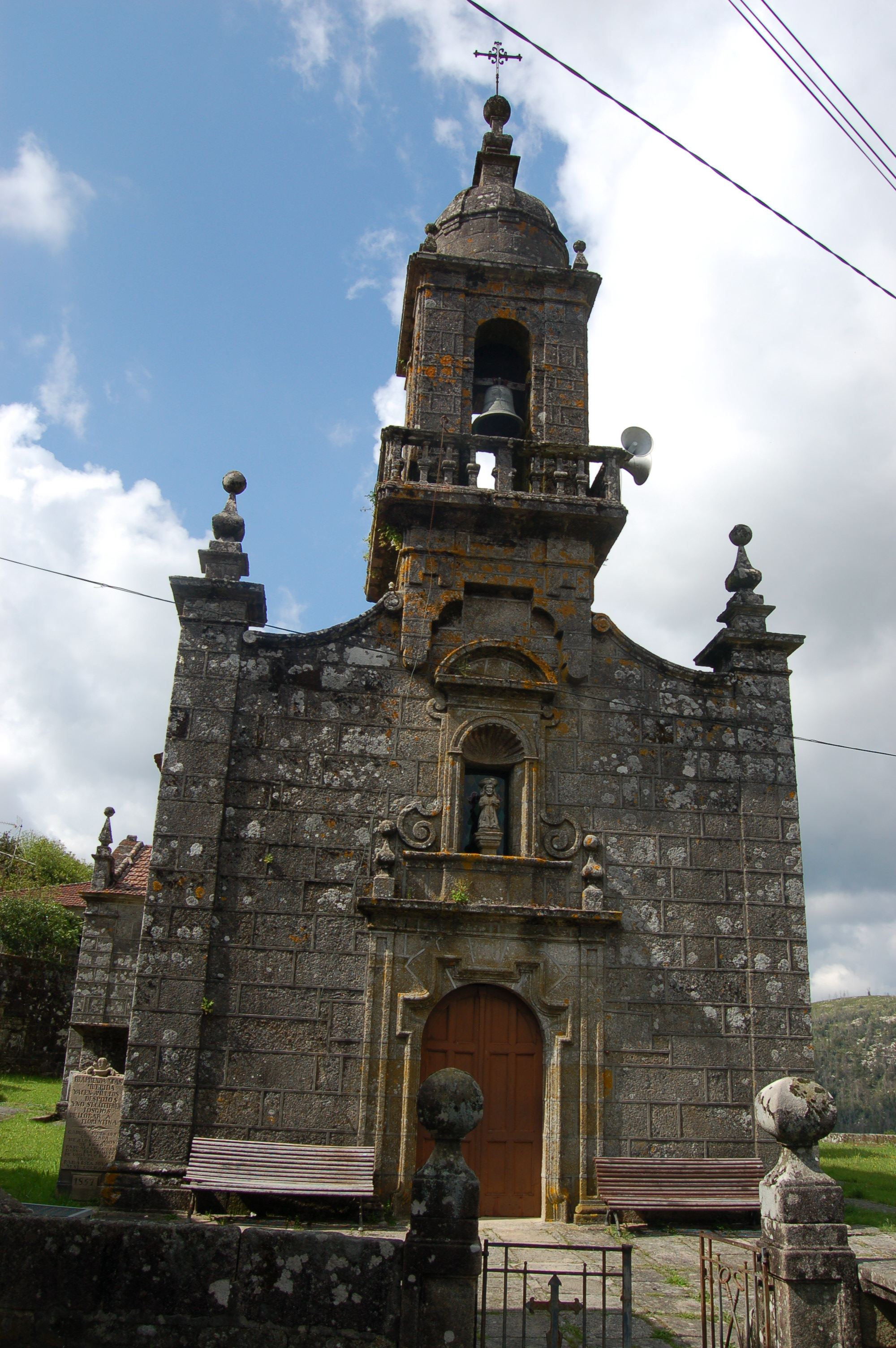 igrexa parroquial de Santiago de Loureiro